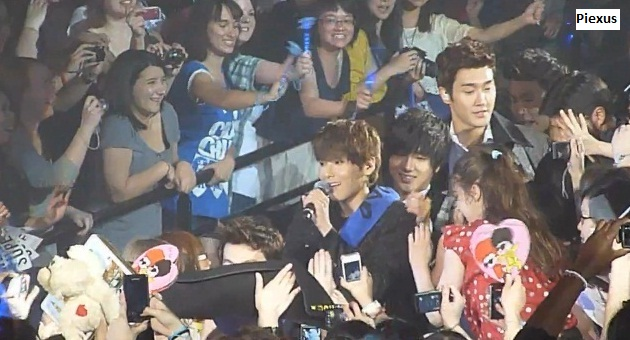 Super junior meeting fans in Paris